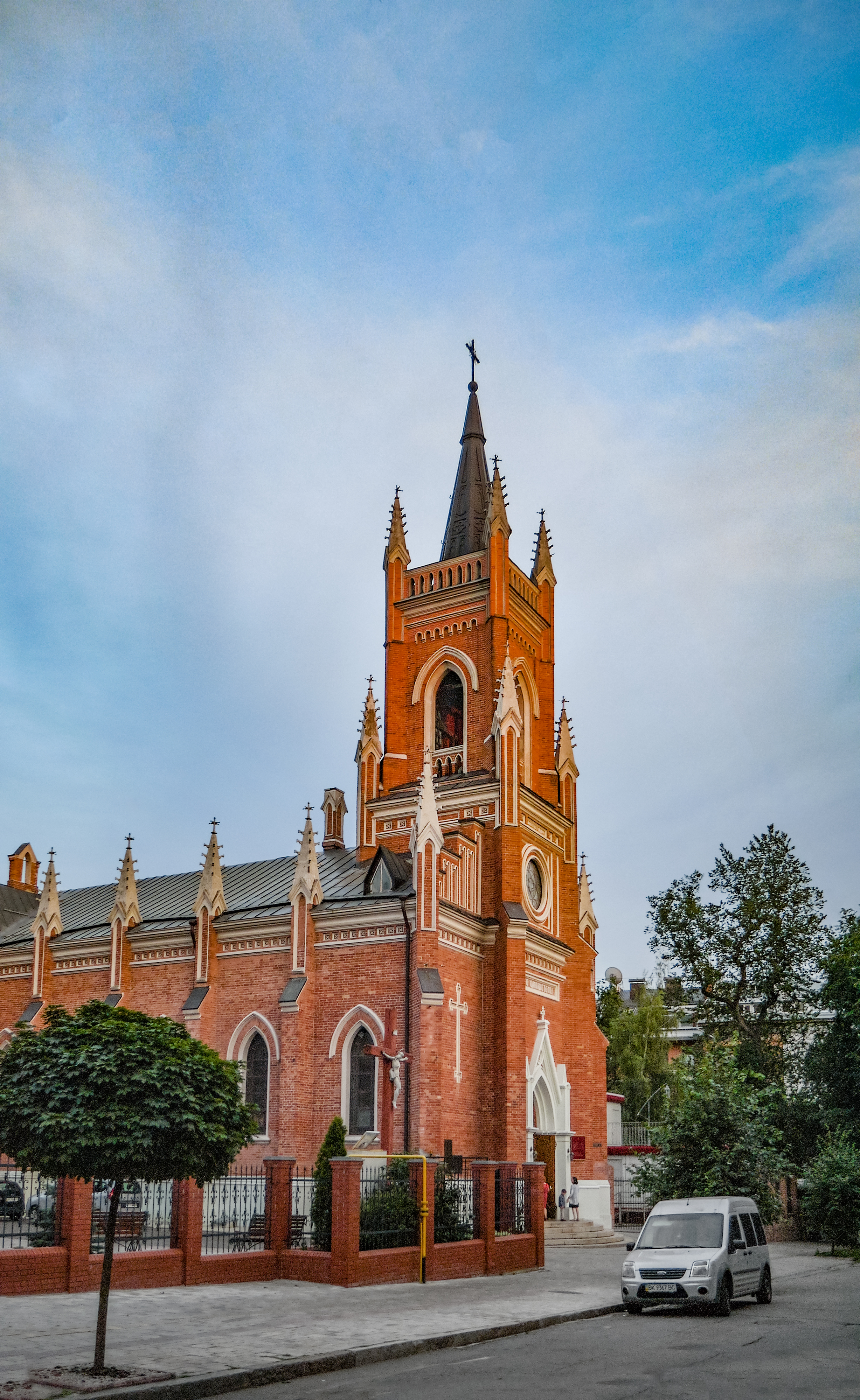 Костел, Харків, вул. Гоголя, 4